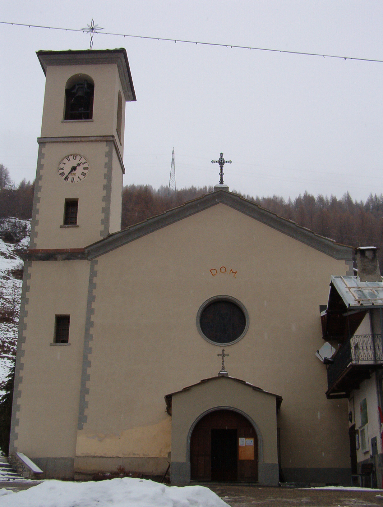 Chiesa di Pragelato nella frazione La Rua - Val Chisone - Piemonte - Italia